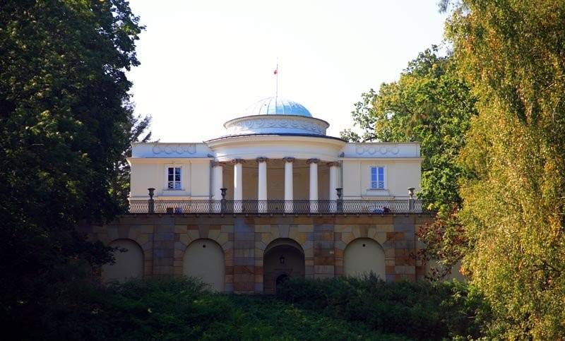 Warszawa (Polska)